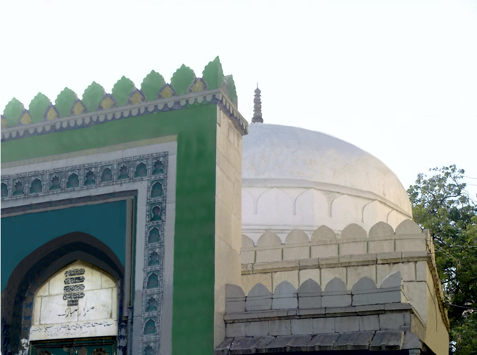 मक़बरा ख़्वाजा हुसैन अजमेरी औलाद (वंशज) ख़्वाजा मोईनुद्दीन हसन चिश्ती रहमतुल्लाह अलैह ,अजमेर शरीफ